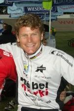 Bruno Risi, ehem. Schweizer Radrennfahrer